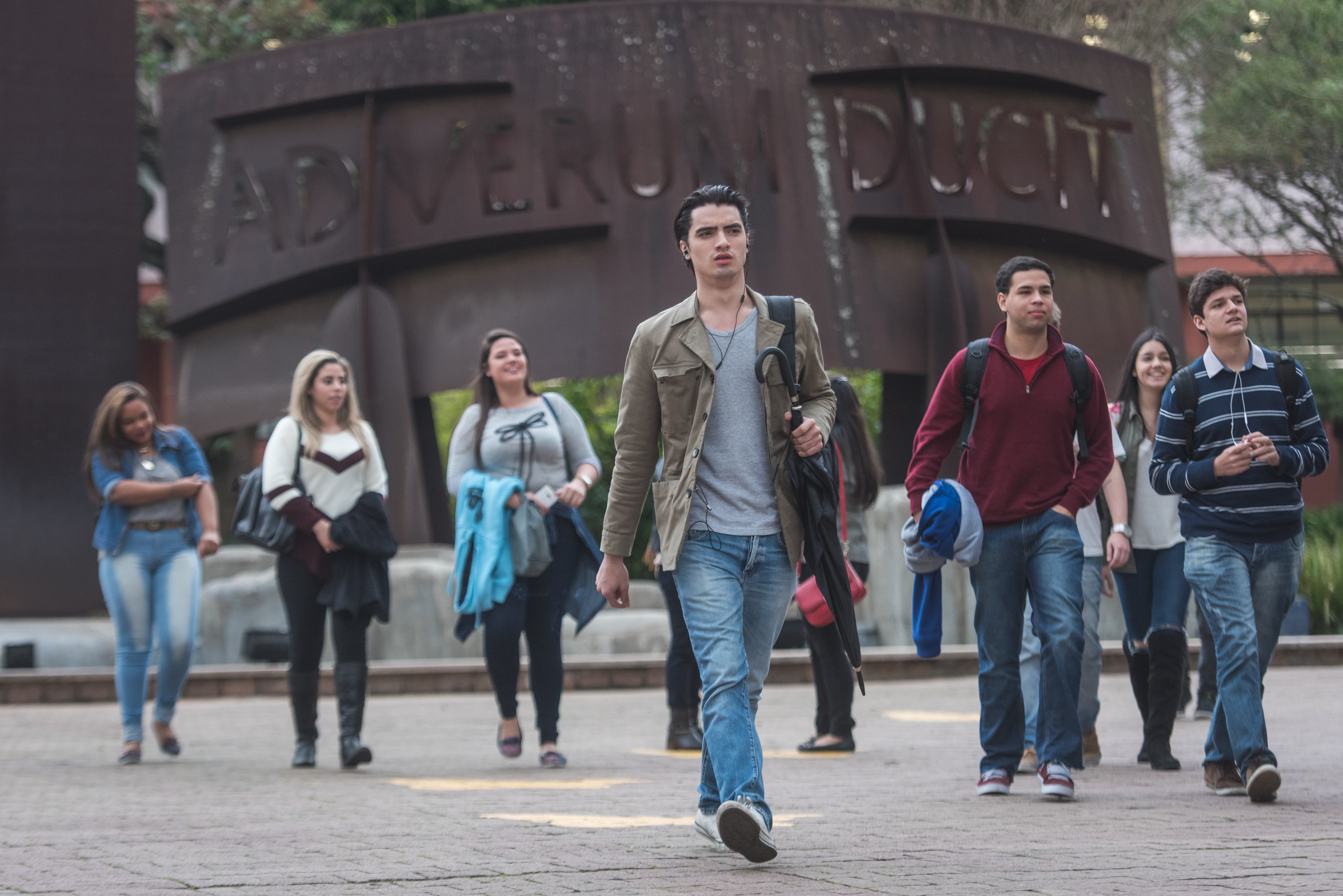 Campus central da PUCRS